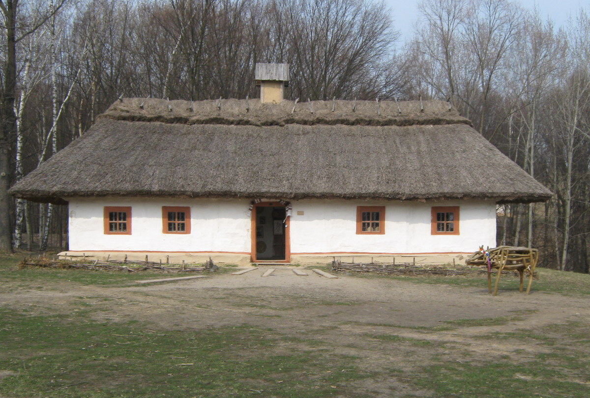 Сульська управа з села Мліїв у Музеї в Пирогові